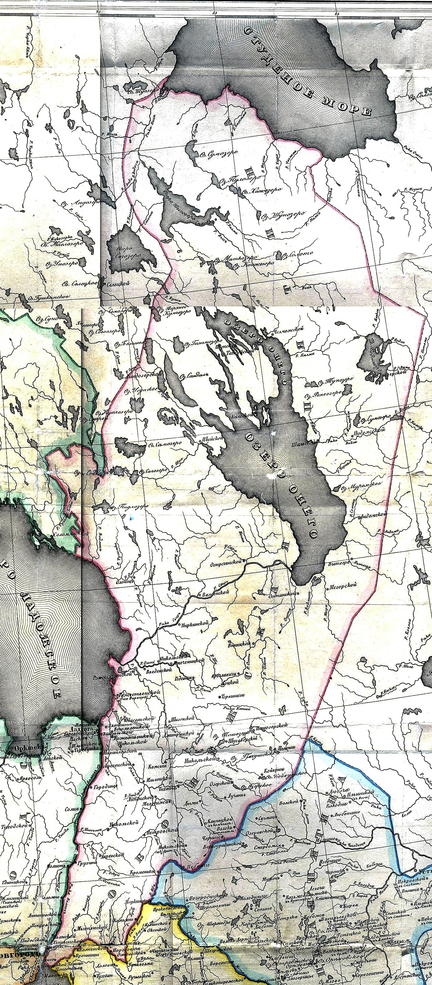 Обонежская пятина - северо-восточная пятина Новгородской земли (XVI век)